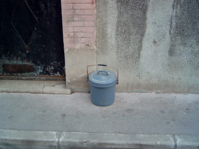 Il s'agit d'une boite à ordure préconisée par Albert Bedouce pour éviter la désolidarisation du couvercle avec le corps du seau, afin d'éviter qu'il ne se détériore, faciliter son usage et éliminer de cette façon la dispersion des déchets par les animaux.